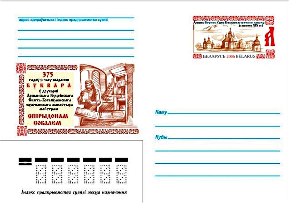 Художественный конверт с оригинальной маркой «375 лет со времени издания букваря Спиридоном Соболем», подготовленный издатцентром «Марка» РУП «Белпочта». Выпущен 11 сентября 2006 года. Художник Виктор Старухин. Иллюстрация - 375 лет со времени издания букваря в типографии Оршанского Кутеинского Свято-Богоявленского мужского монастыря мастером Спиридоном Соболем — на бел. языке, книгопечатник.